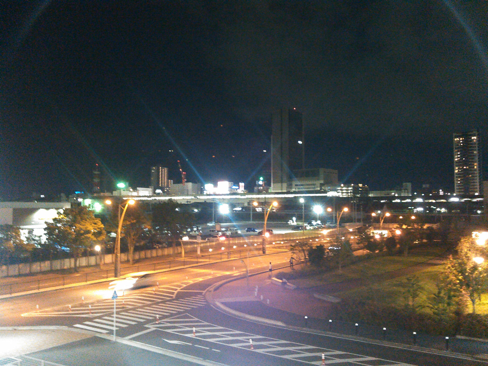 郡山駅東側から郡山駅西口方向を望む